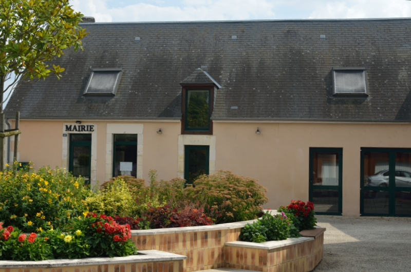 Mairie de Condé (Indre)